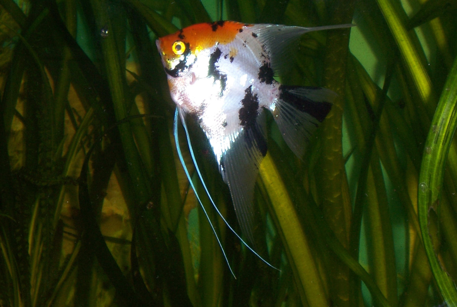 Skalar - Pterophyllum scalare "Koi"